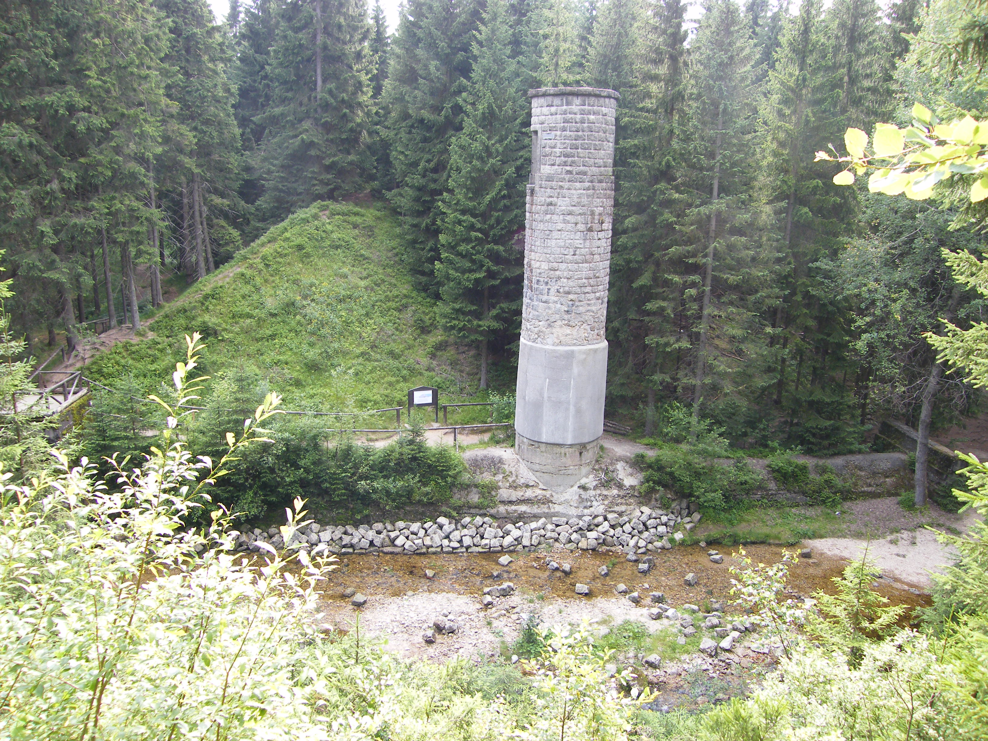 Protržená přehrada na řece Desná, Jizerské hory, ČR